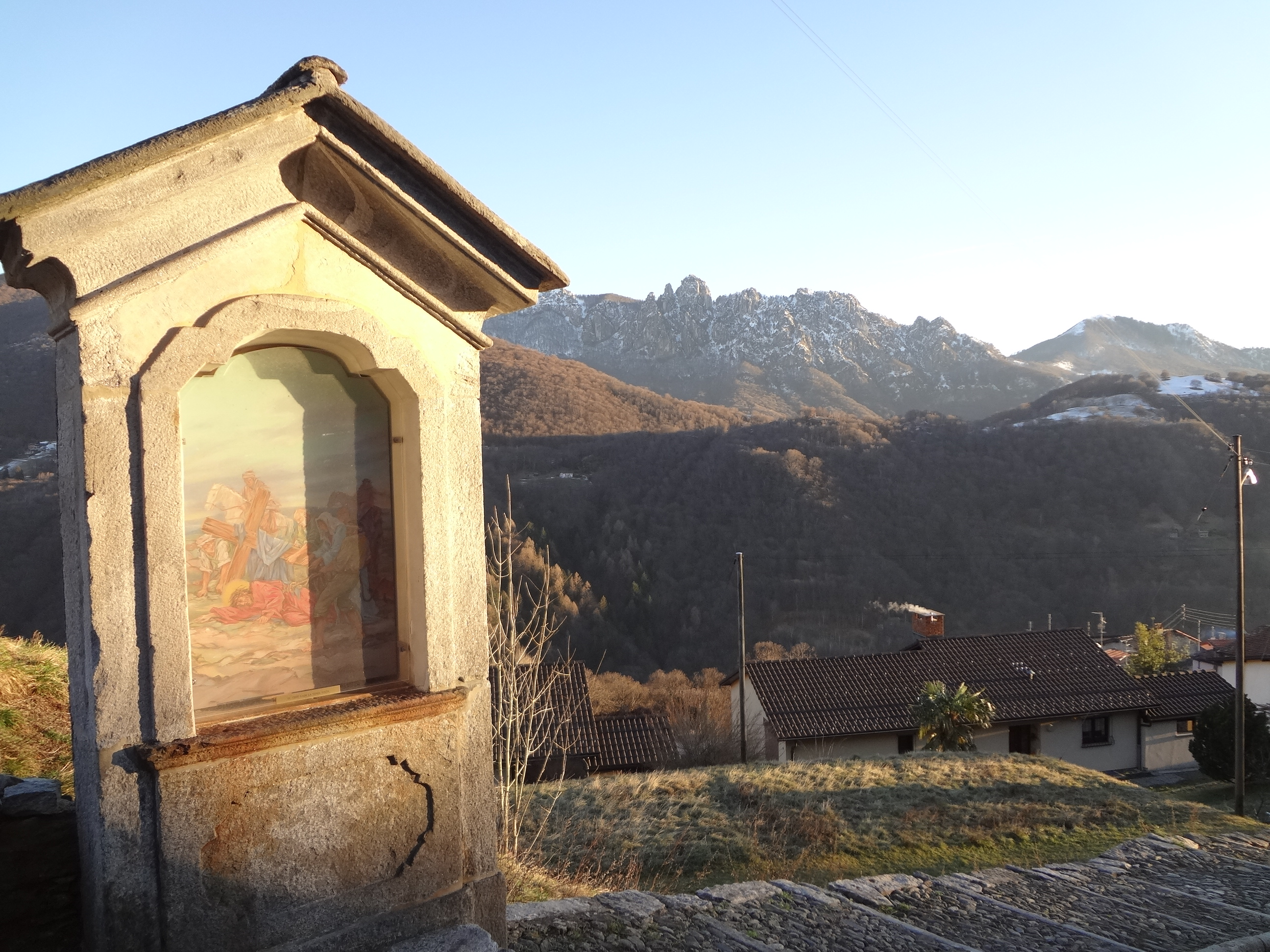 Chemin de croix à Bidogno . Vue sur les Denti della Vecchia.